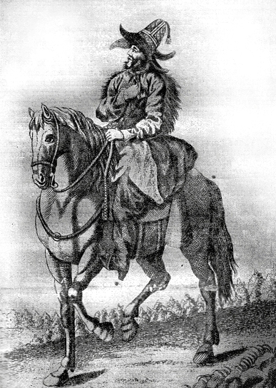 Гравюра минусинского татарина